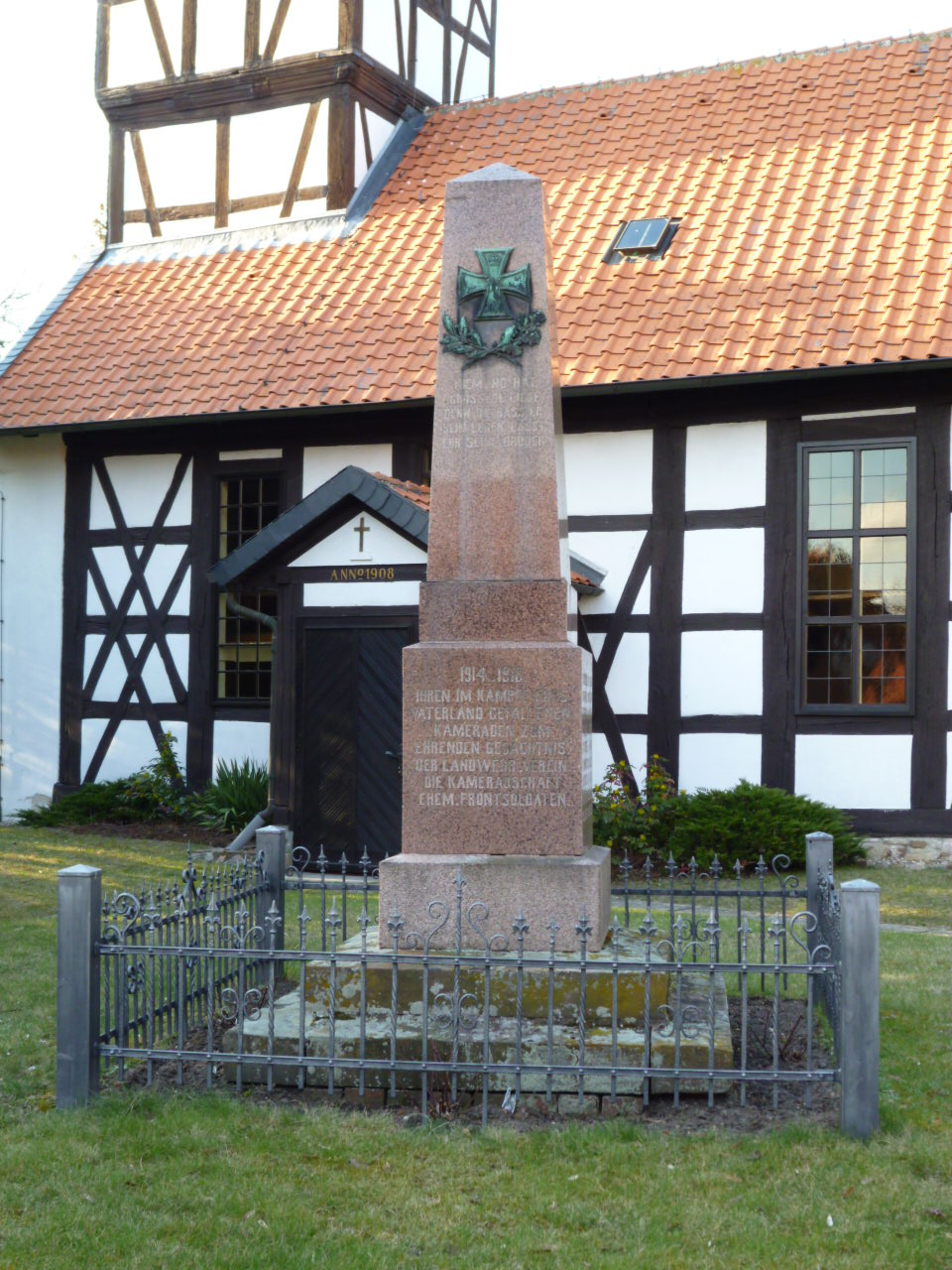 Calvörde-Zobbenitz, Im Dorf, Kriegerdenkmal